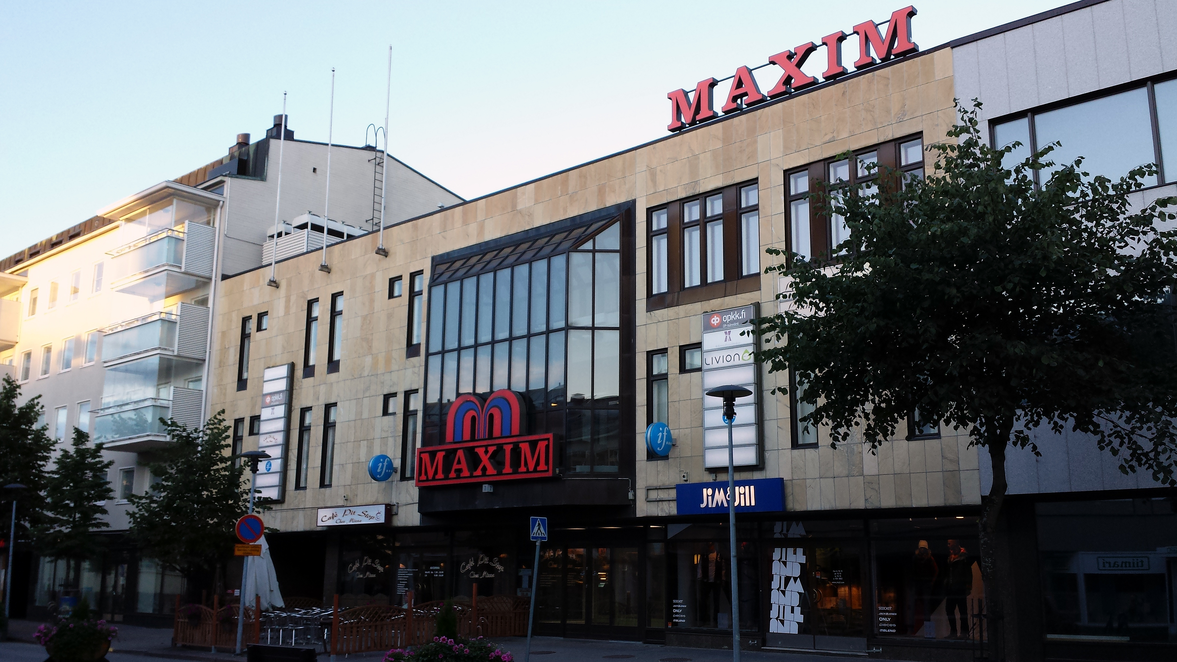 Kauppakeskus Maxim Kokkolassa, Suomessa.